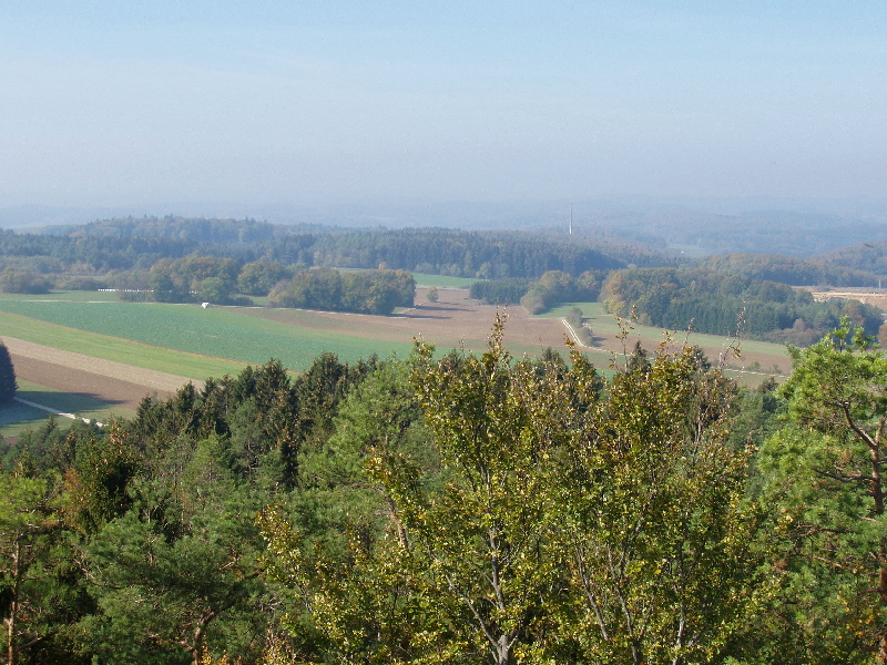 Albhochflaeche (Original text: Albhochfläche bei Erpfingen) Erstellungsdatum: Juni 2003 Fotograf: Peter Schüle